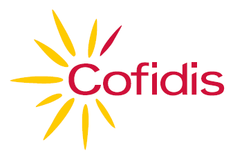 Logo společnosti Cofidis s. r. o.